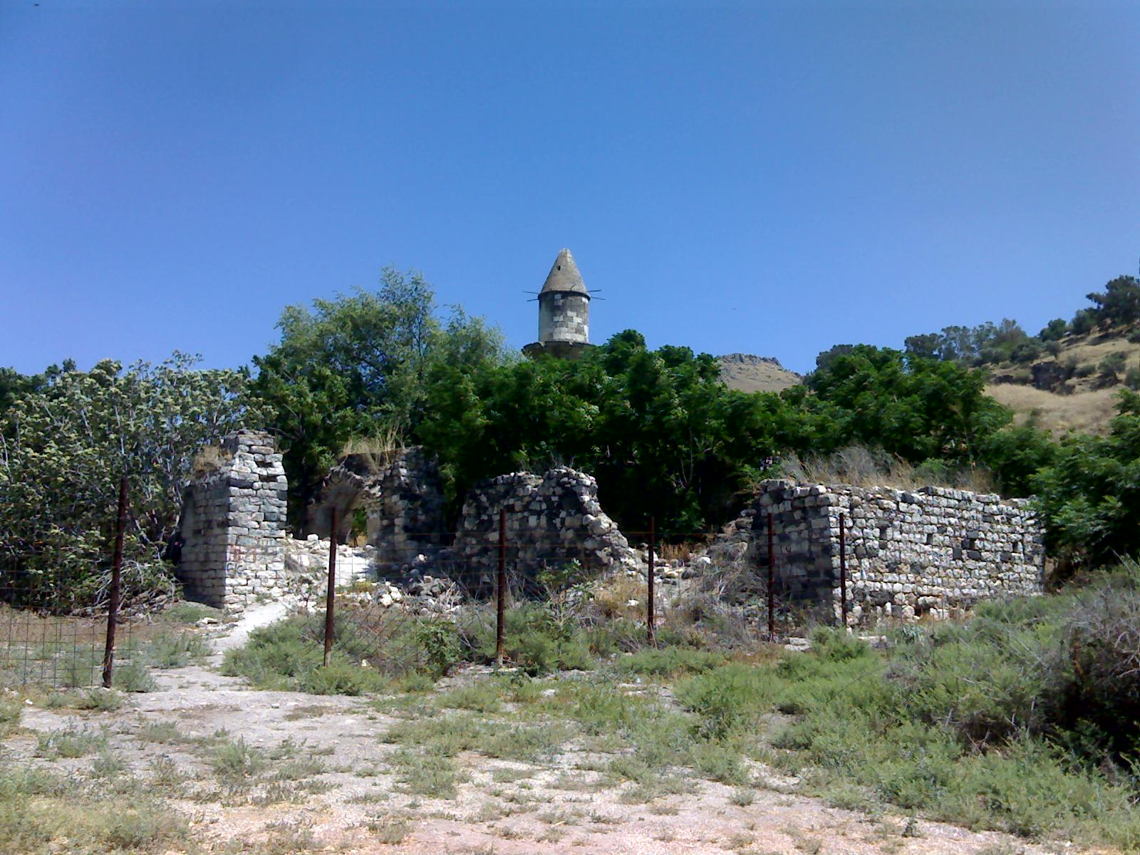 Mosque at Hittin